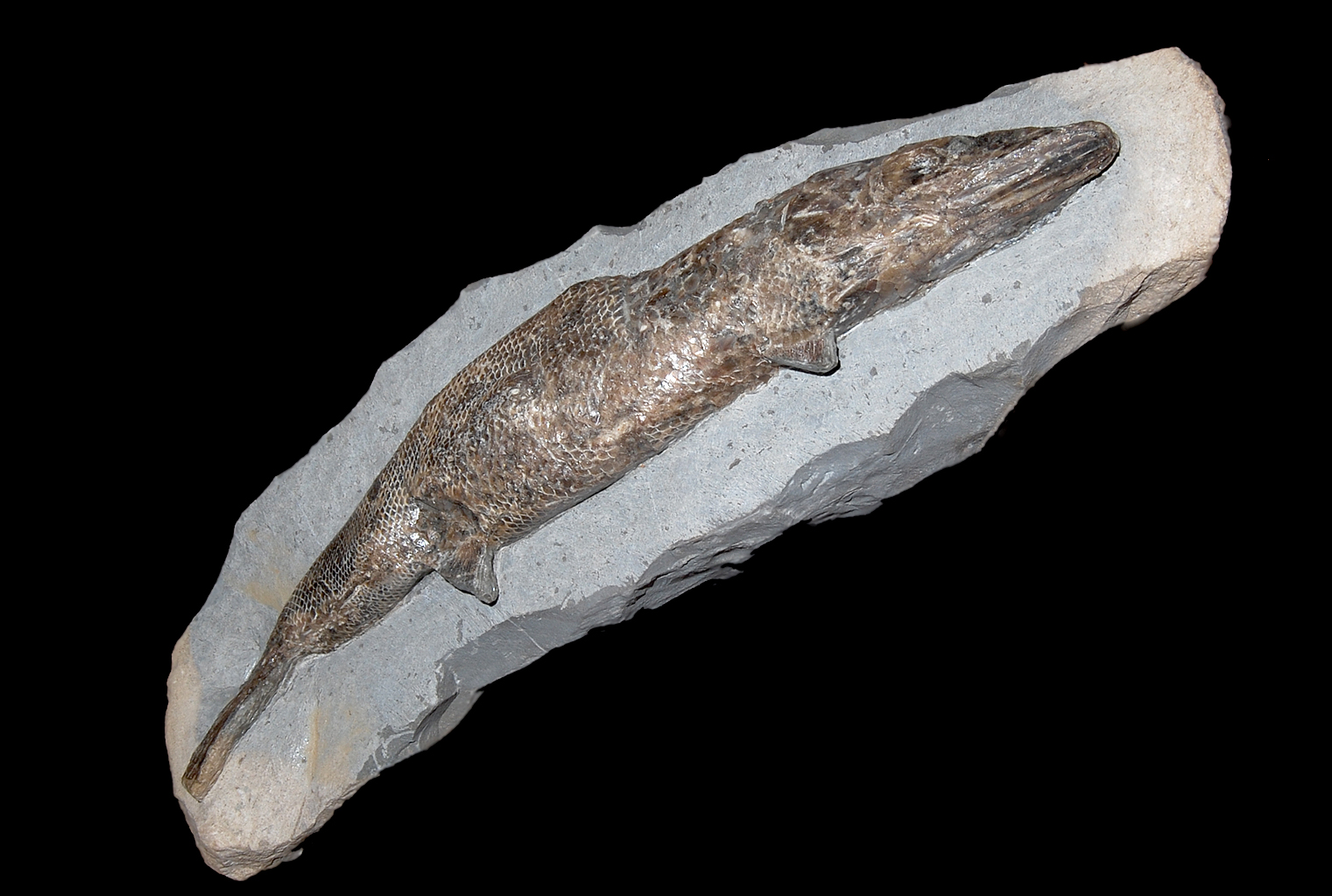 Naturhistorisches Museum Wien